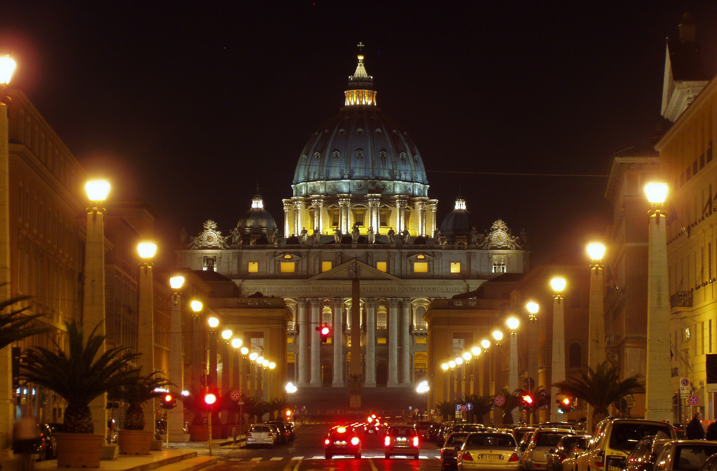 Basilica di San Pietro, Rome